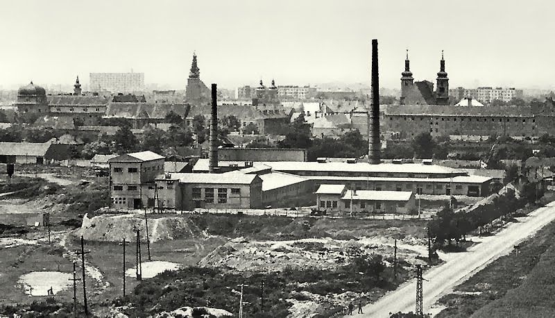 Diamantova tehelňa